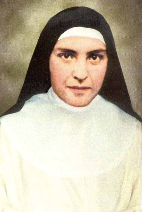 Maria Gabriella Sagheddu - trapistka